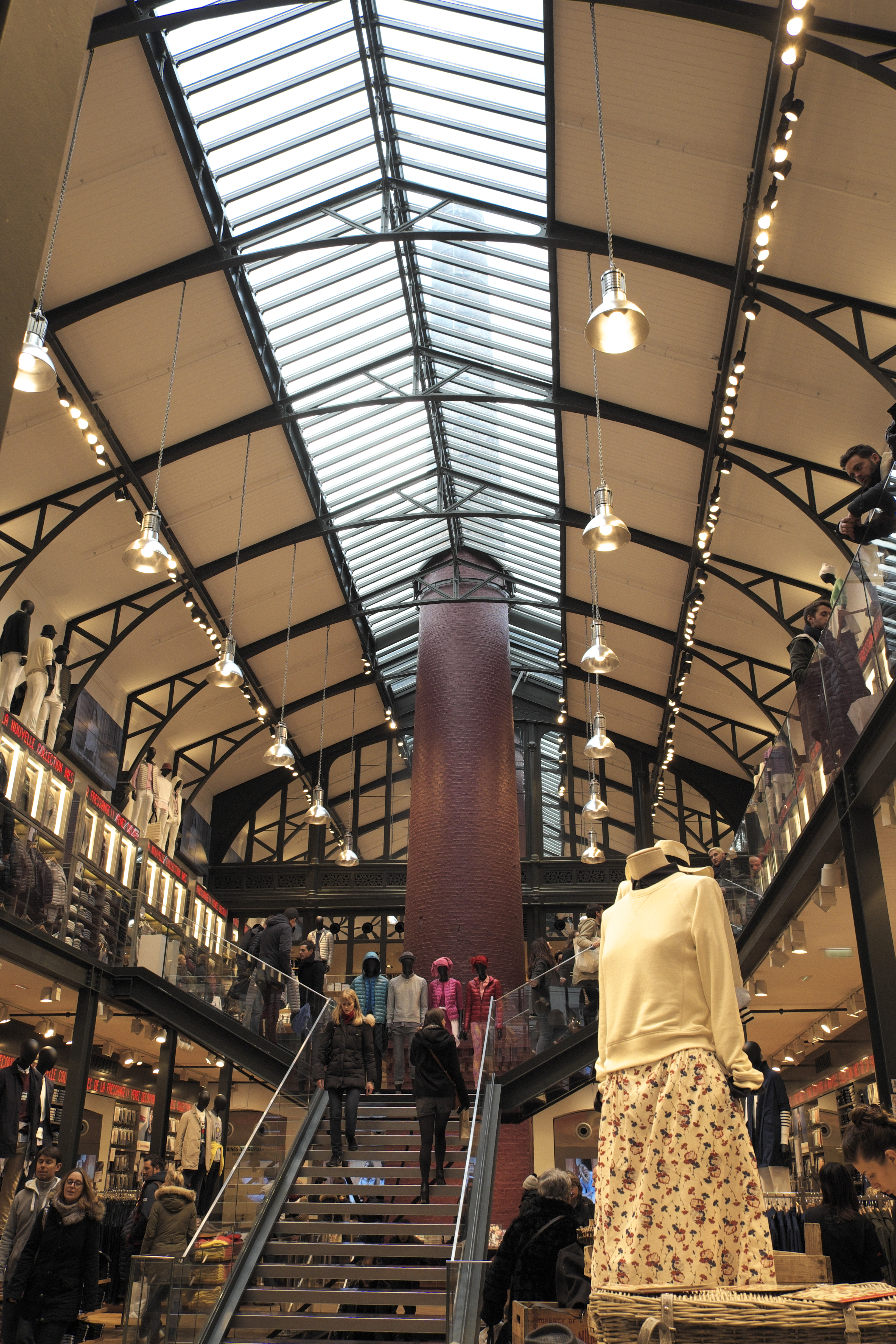 Ehemaliges Gebäude der Société des Cendres in der Rue des Francs-Bourgeois Nr. 39 im 4. Arrondissement in Paris, seit 2014 ist hier ein Modegeschäft untergebracht